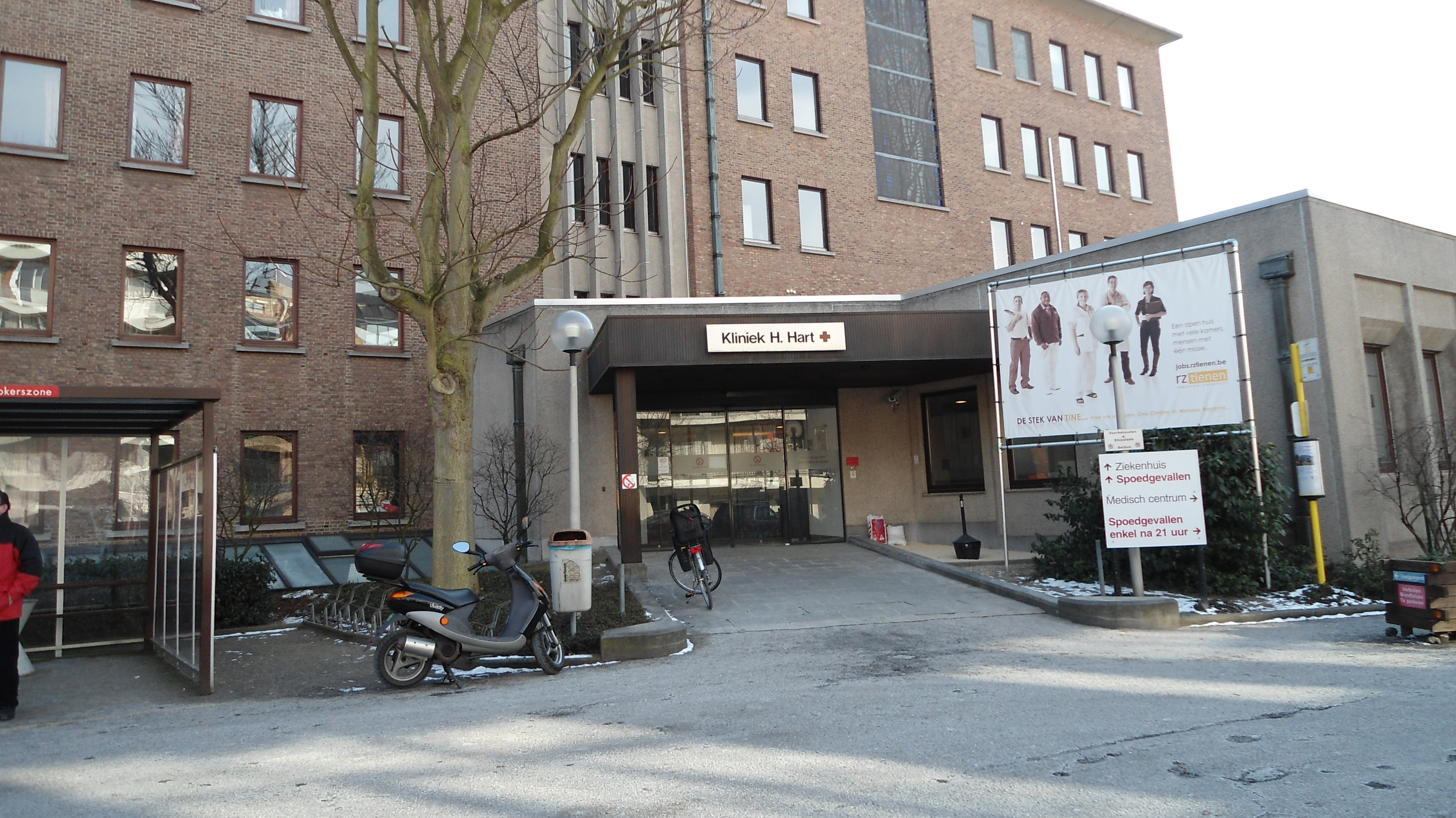 RZ Heilig Hart - Kliniekstraat - Tienen - Vlaams-Brabant - België